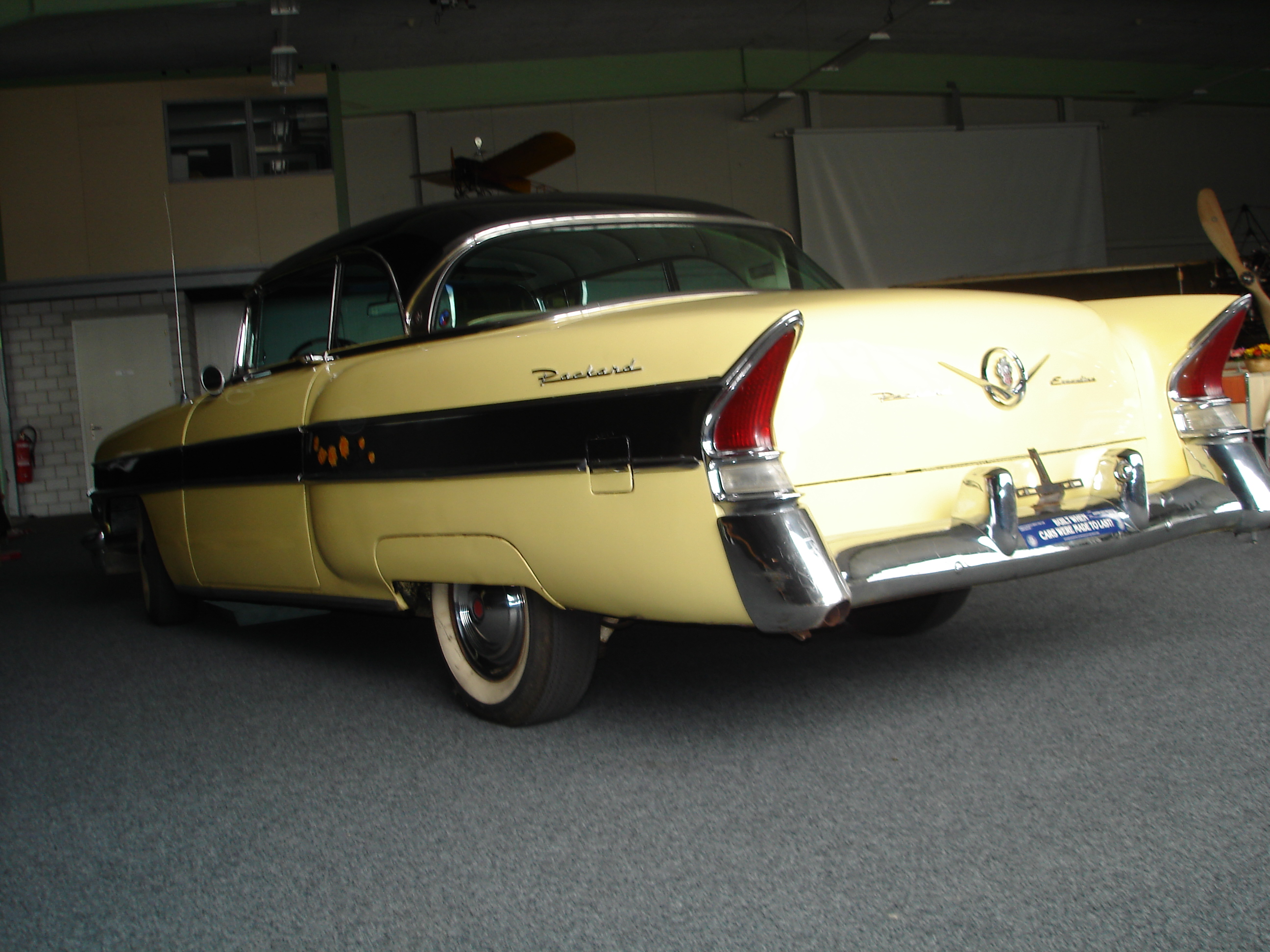 1956 Packard Executive (model 5677) rear left